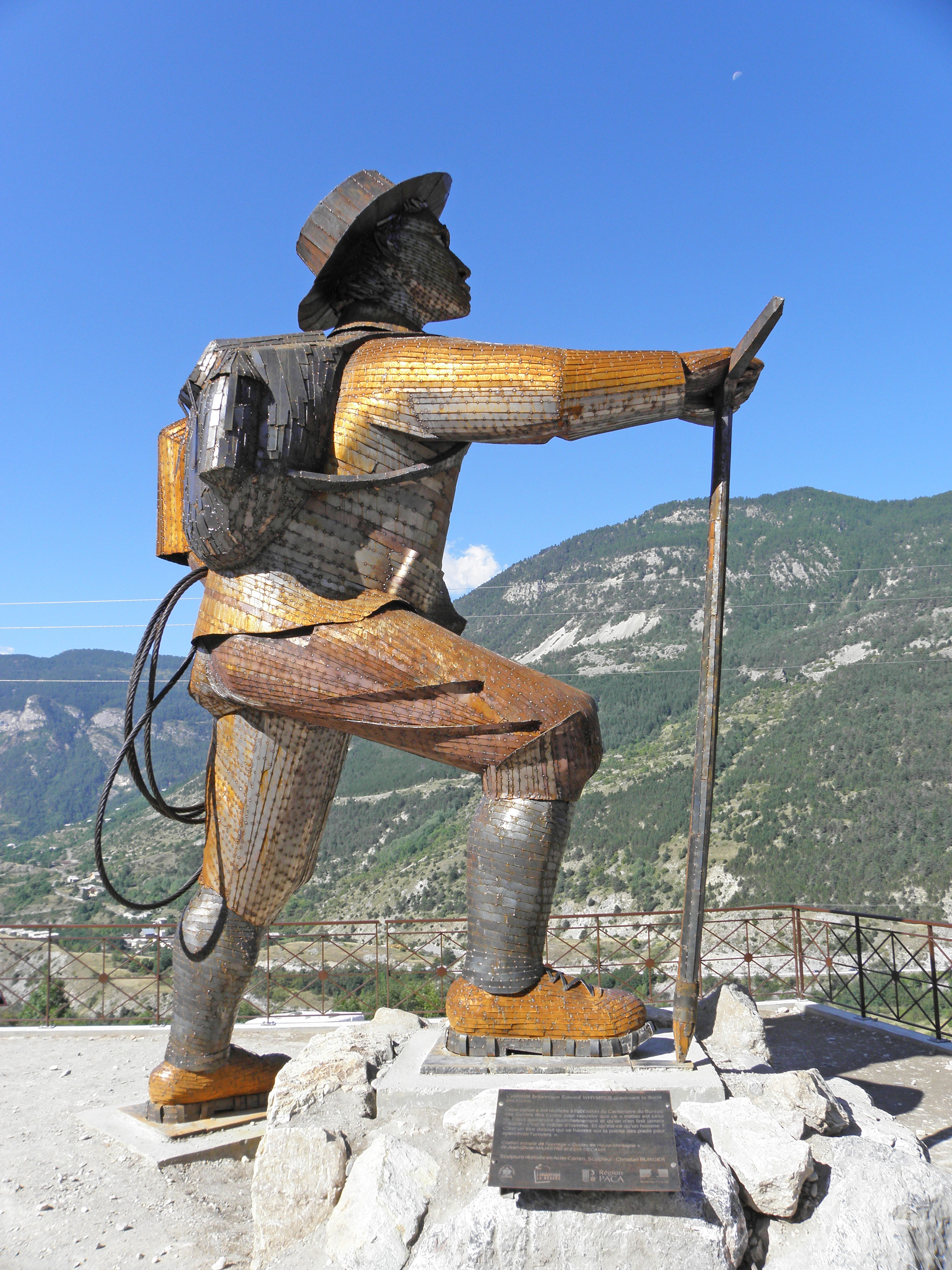 Sculpture de l'alpiniste britannique Edward Whymper (L'Argentière-la-Bessée)